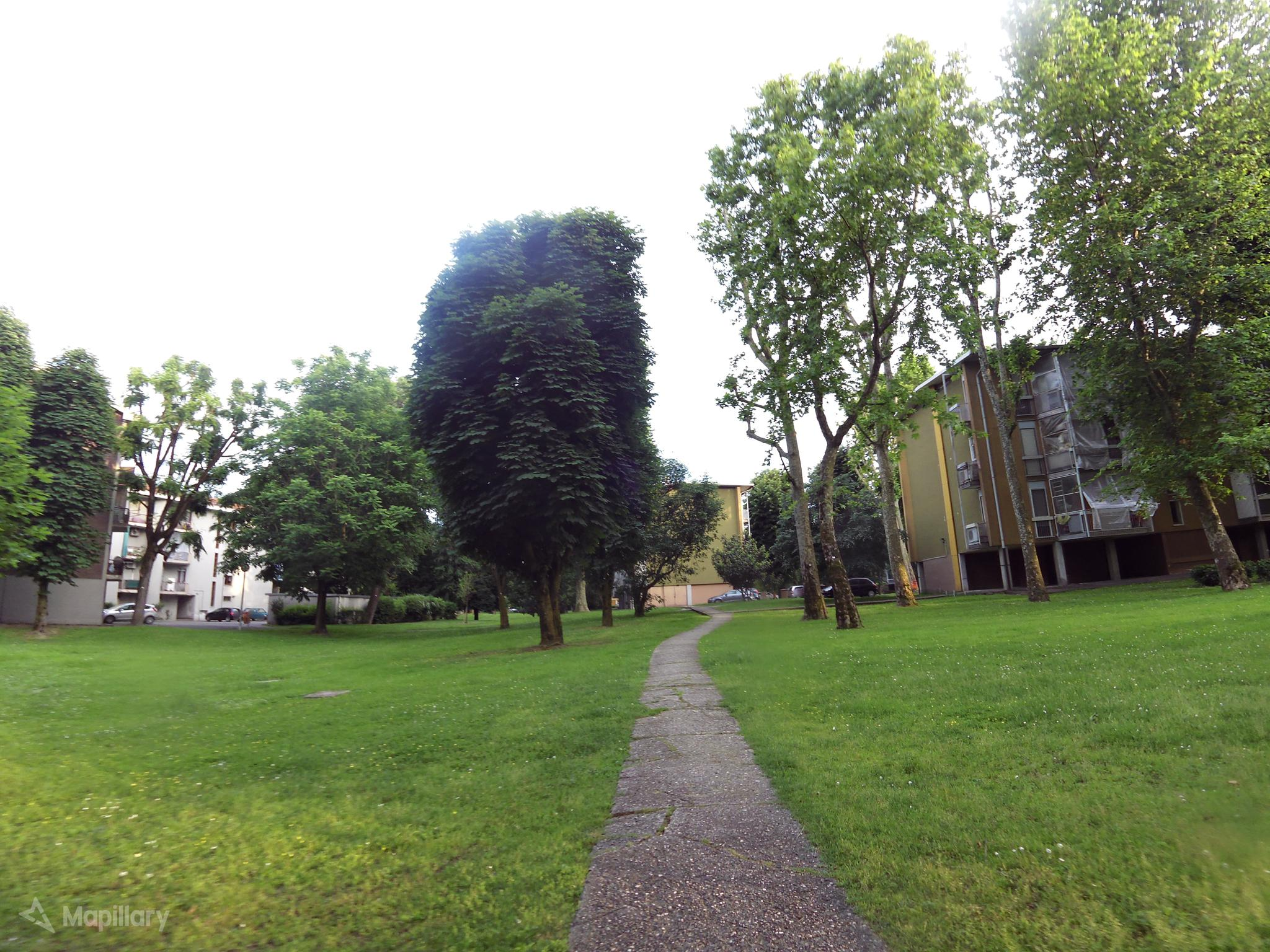 Bolgiano area residenziale via ferrandina 24 maggio 2018